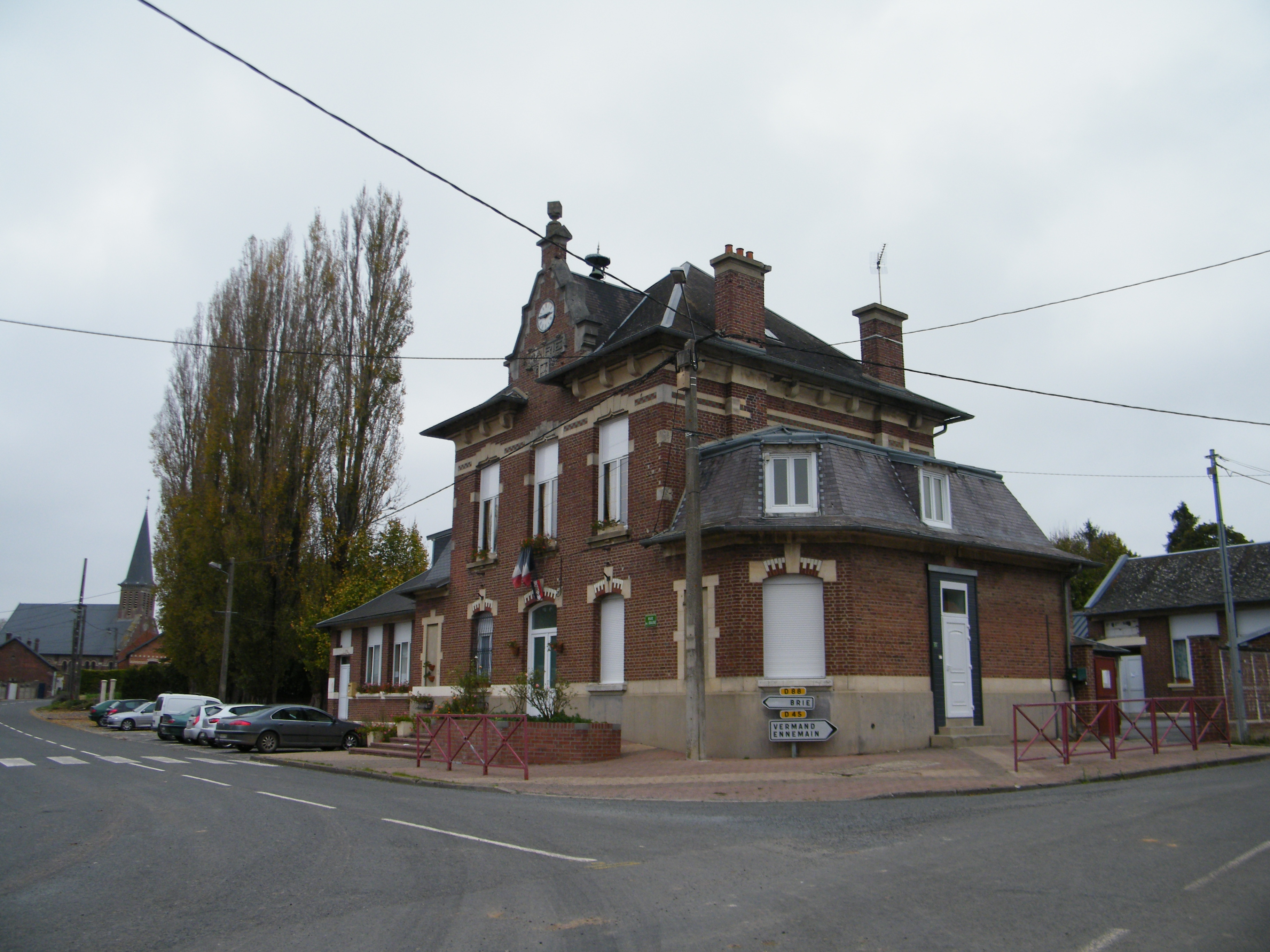 Bâtiments communaux.